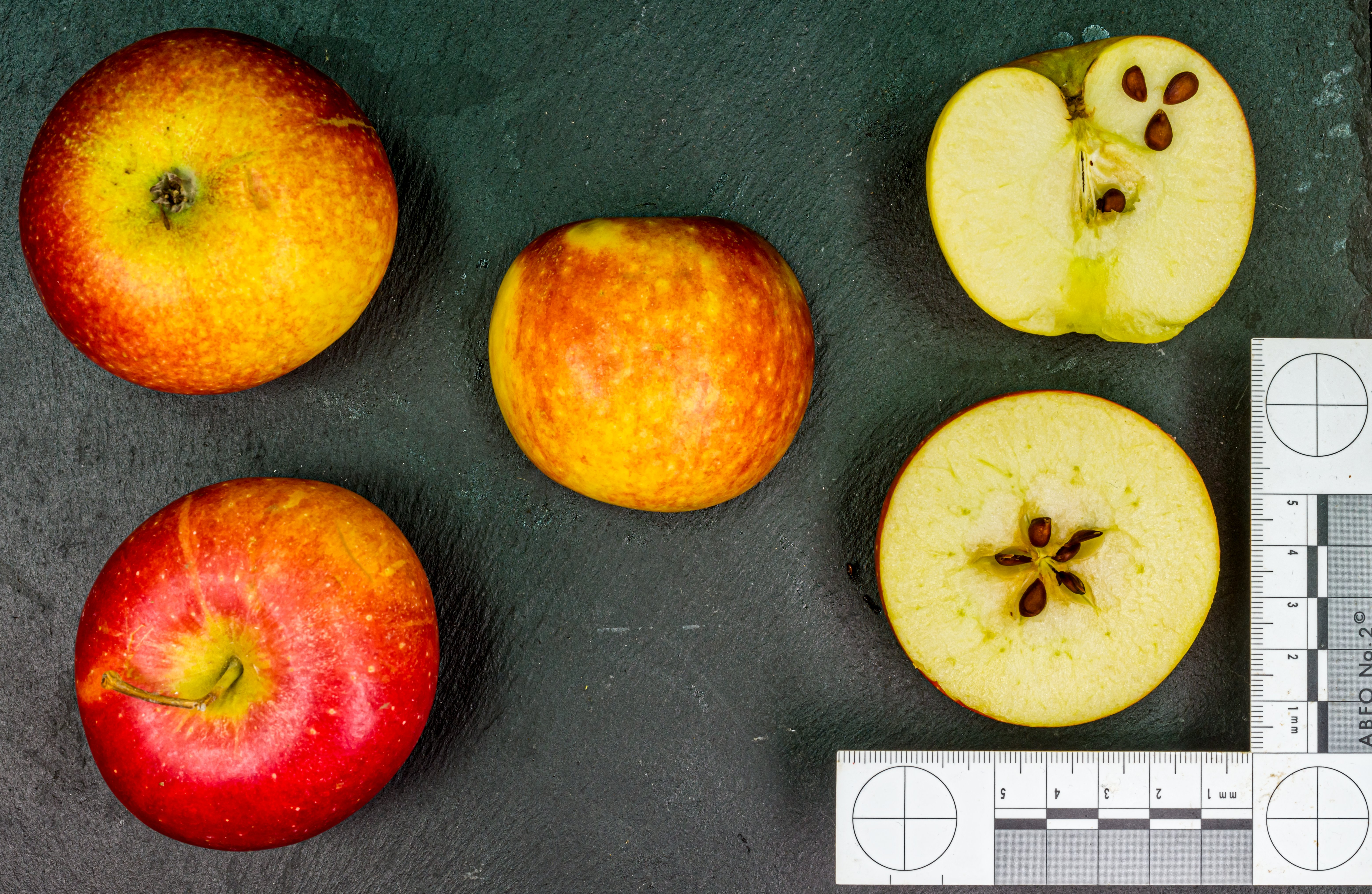 Apfelsorte Ingrid-Marie, auch Hoed Orange Zufallssämling, 1910 Typische Apfelsort des alten Landes